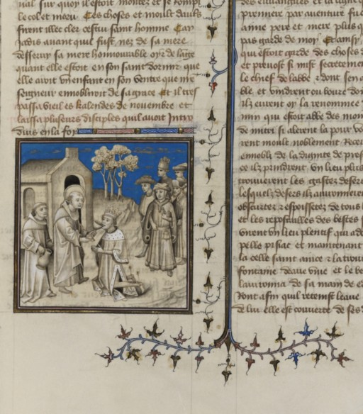 Saint Calais et Childebert Ier. Vincent de Beauvais (1190?-1264?) (auteur) et Jean de Vignay (1282?-13..) (Traducteur). Miroir historial. - Bruges. Folio 210, 1455 ?